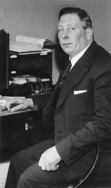 portrett, mann, riksrevisor, sittende knefigur ved skrivebord.